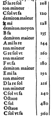 Tonleiter für Dudelsäcke